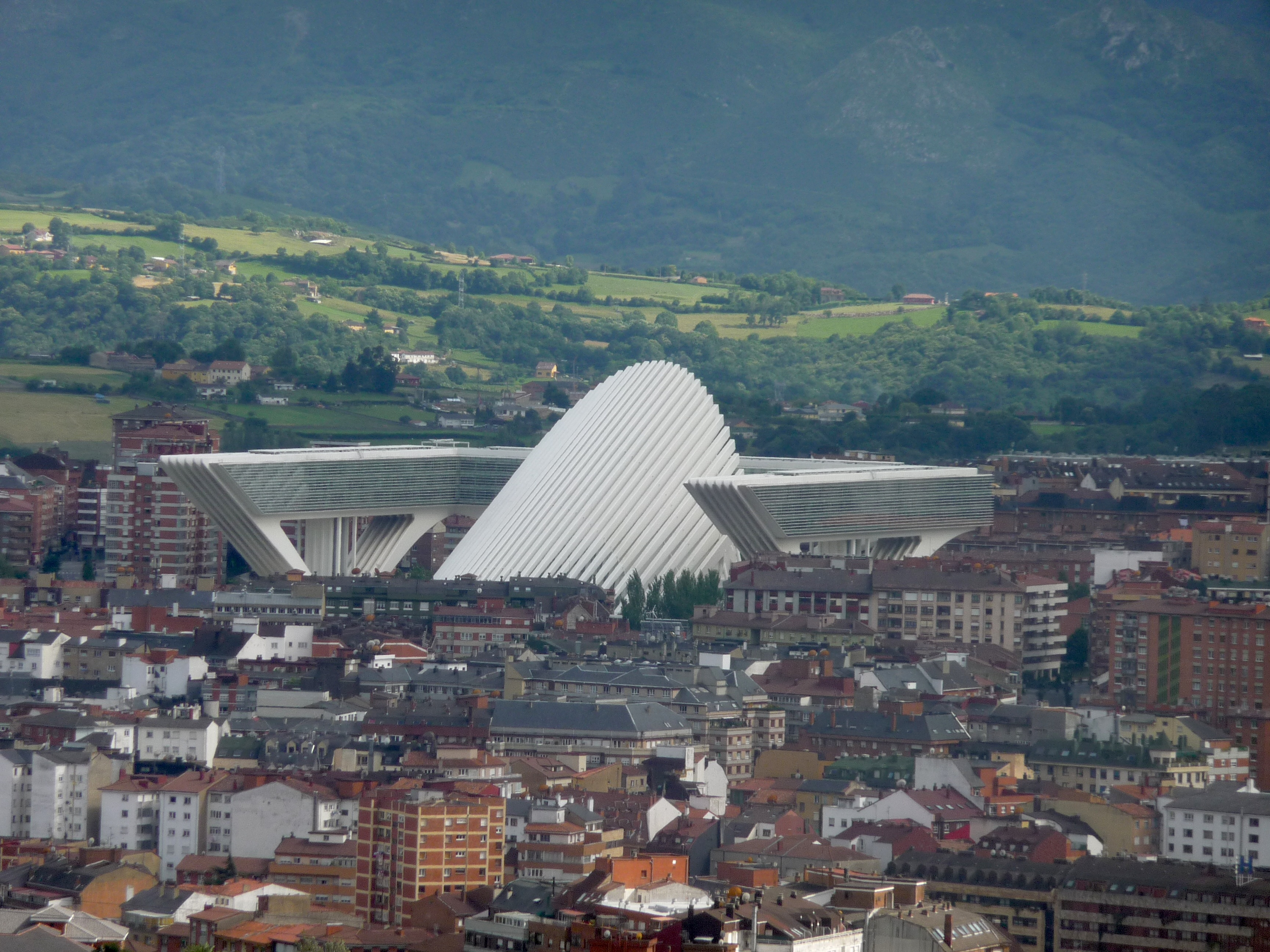 Palais des Congrès architecte Santiago Calatrava